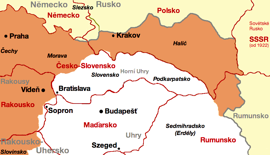 Horní Uhry po 1. světové válce – Slovensko, Podkarpatsko – nově vzniklé státy, zaneseny hranice Rakouska-Uherska Autor: AlphaCentauri Zdroj: Upravená mapa Image:Österreich-Ungarns_Ende.png Úprava: --Wiki-vr 18:39, 19. 3. 2005 (UTC)